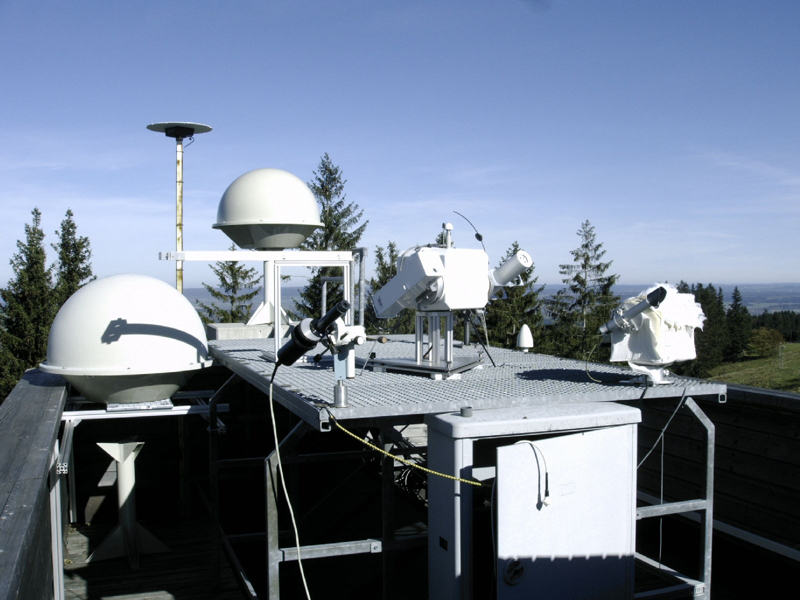 Hohenpeißenberg Messung